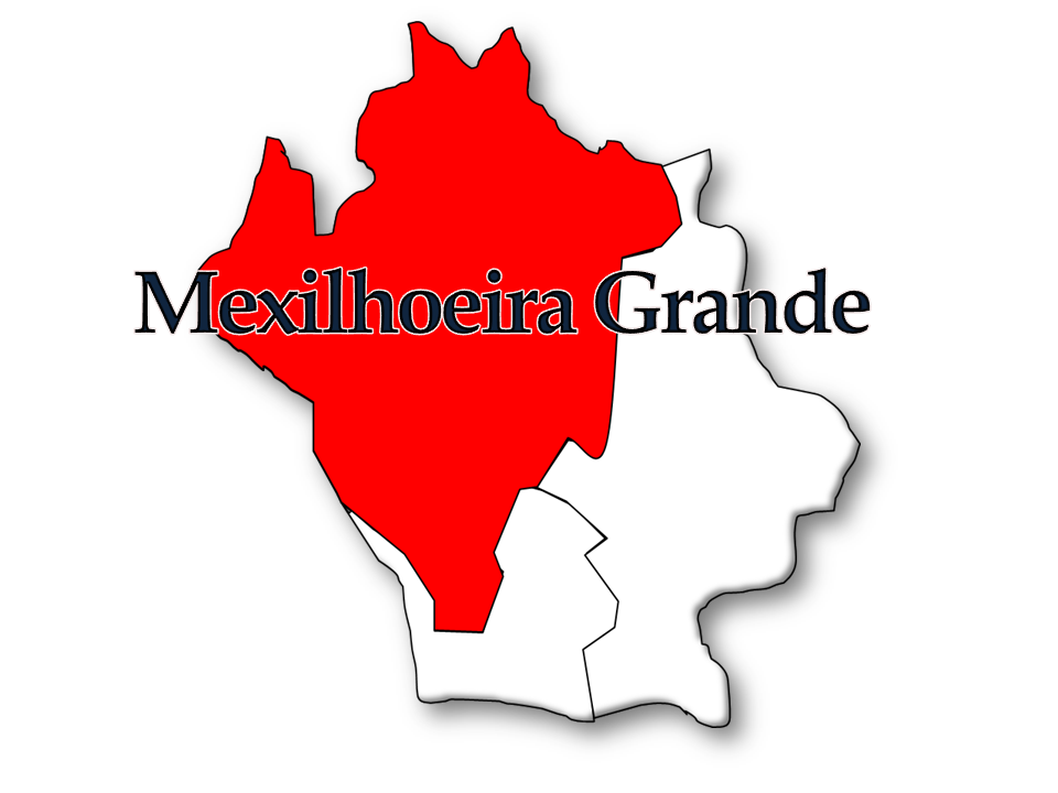 Censos 1864/2011